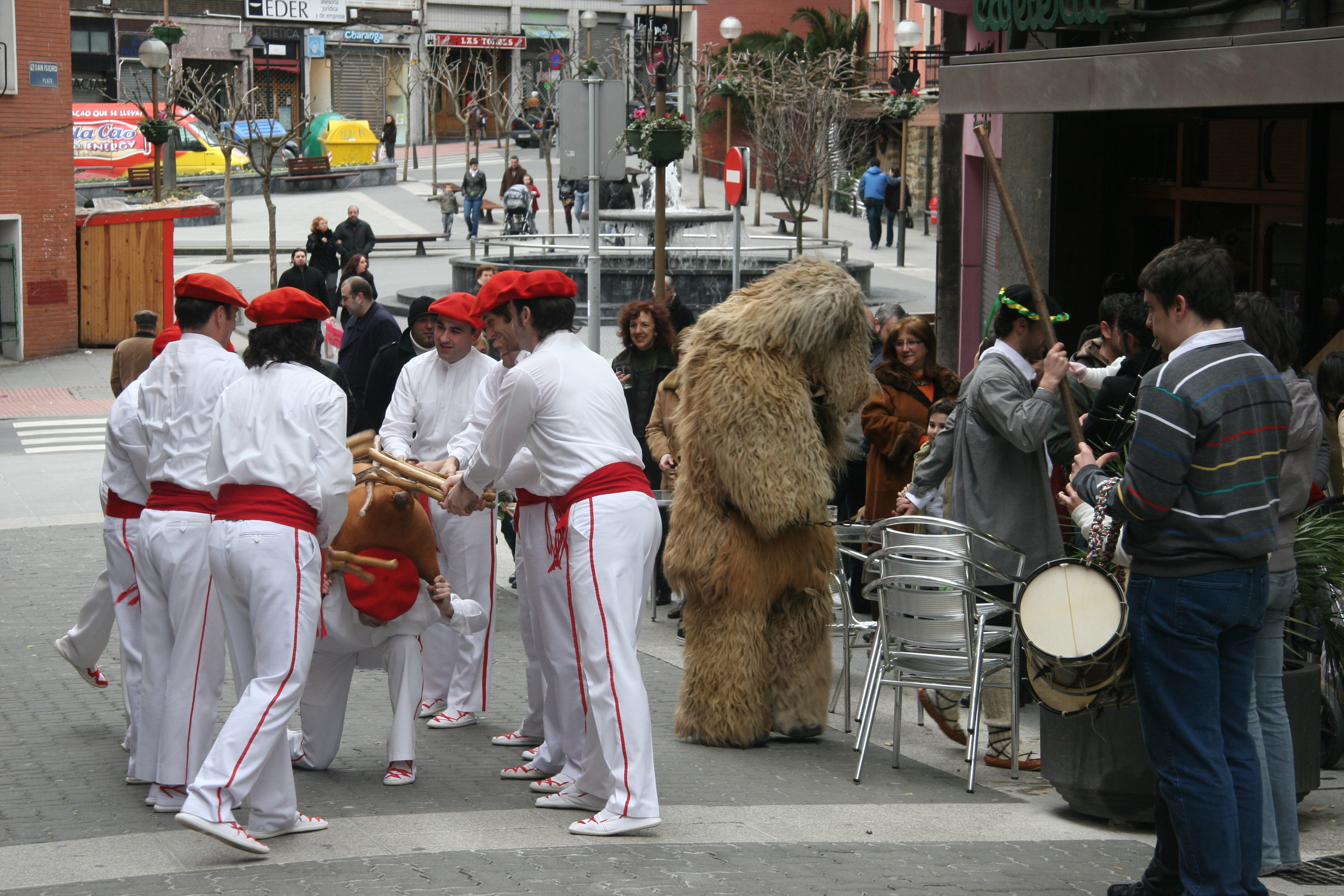 Basauri: Markinako zahagi dantzaren erakustaldia.